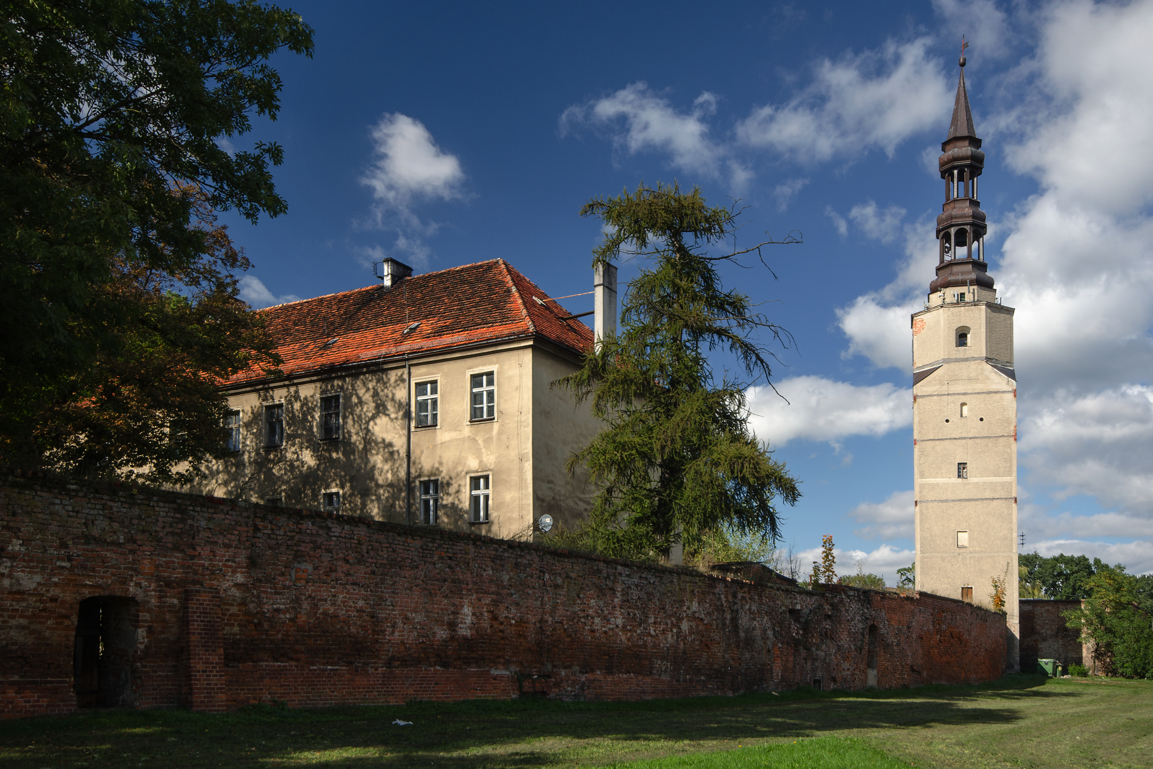 Bierutów, zespół zamkowy, XV, XVII